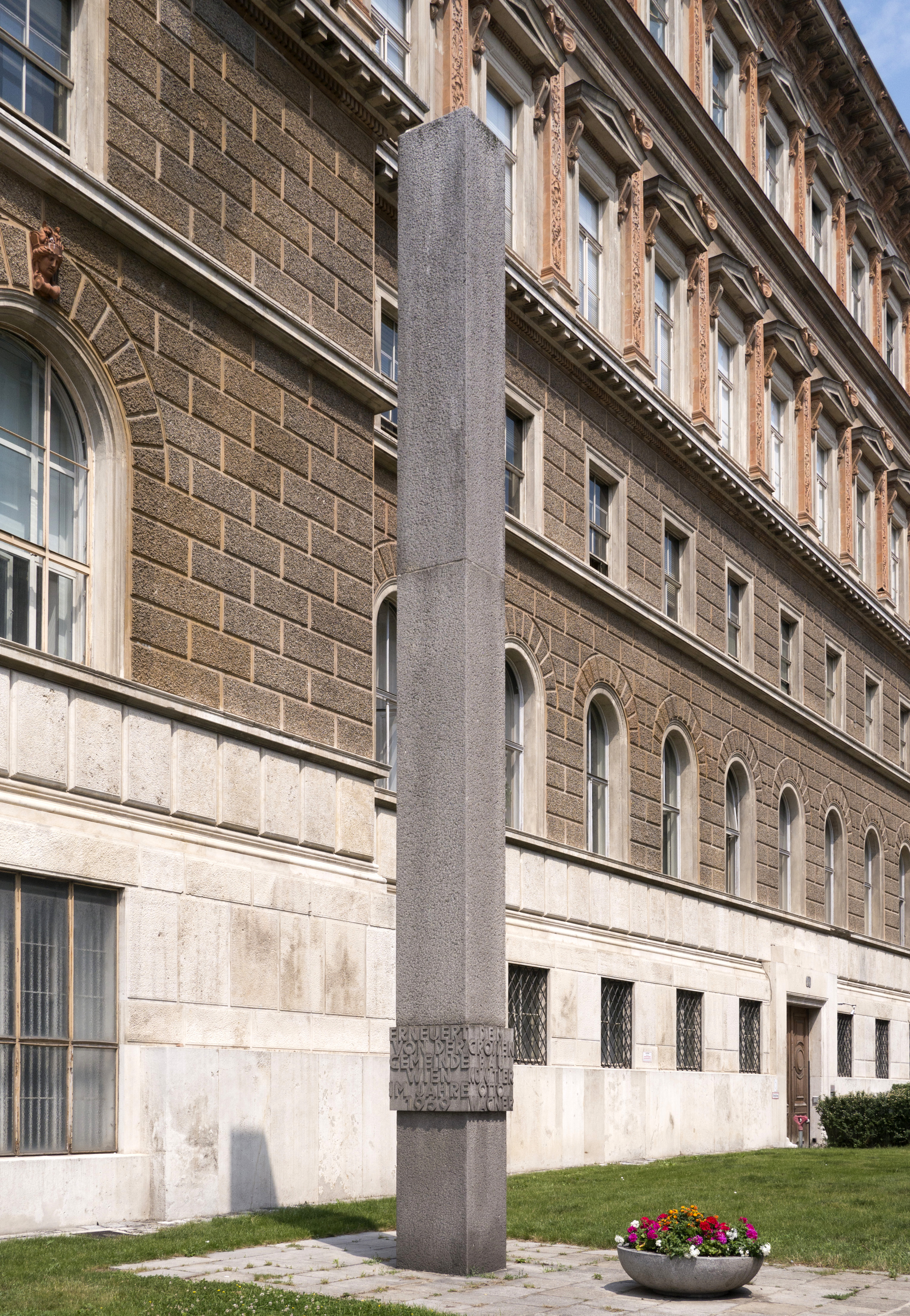 Otto Wagner - Denkmal